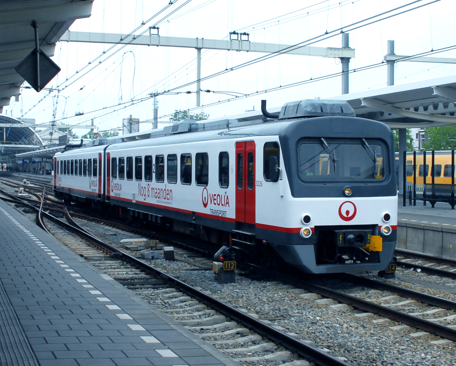 Veolia treinstel 3226 van het type Wadloper te Zwolle. Dit treinstel was voor onderhoud onderweg naar de NedTrain werkplaats te Onnen.